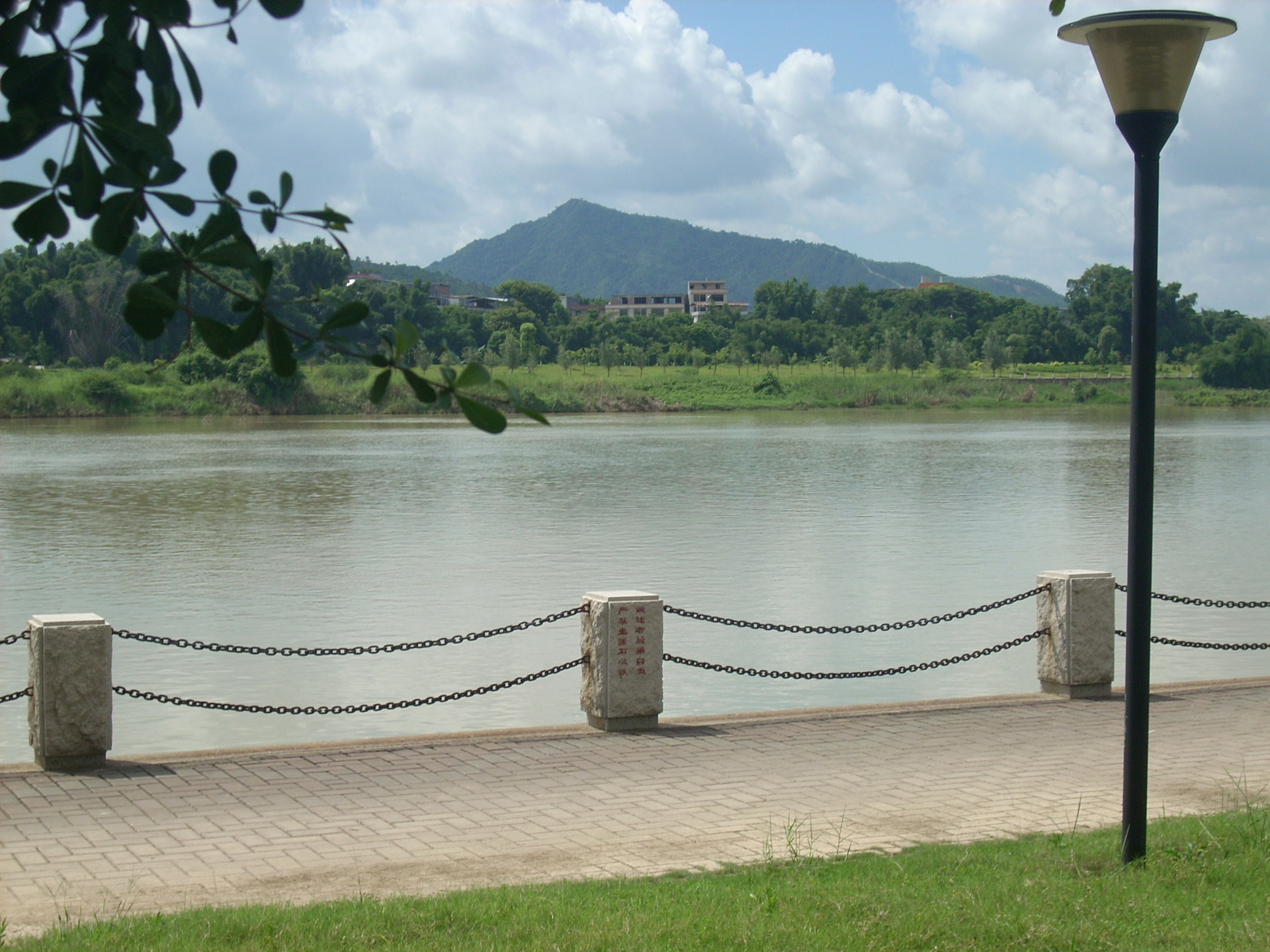 东江畔（源城段）